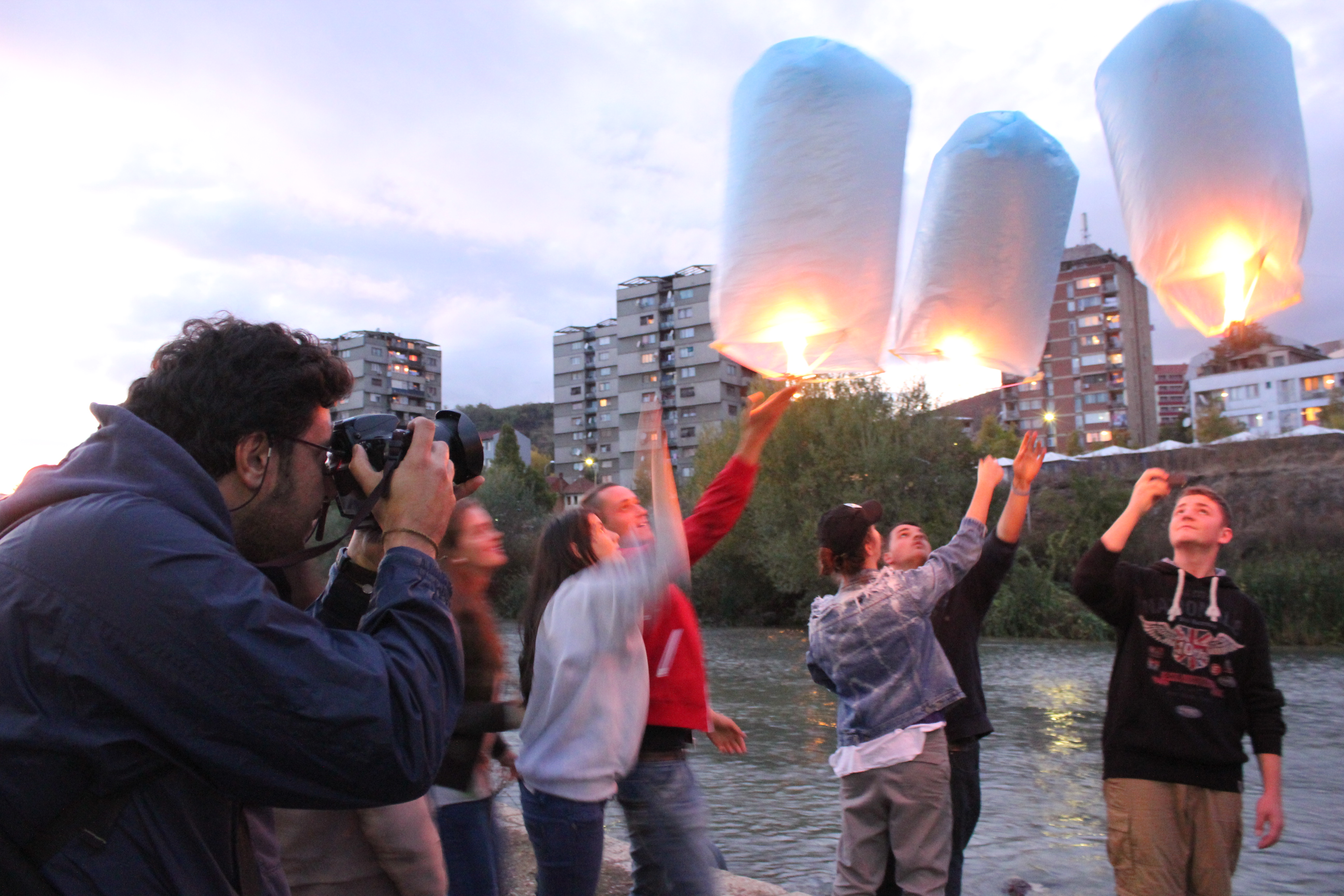 Artistët e rinj Mitrovicas duke e shprehur talentin e tyre në afërsi të lumit Ibër